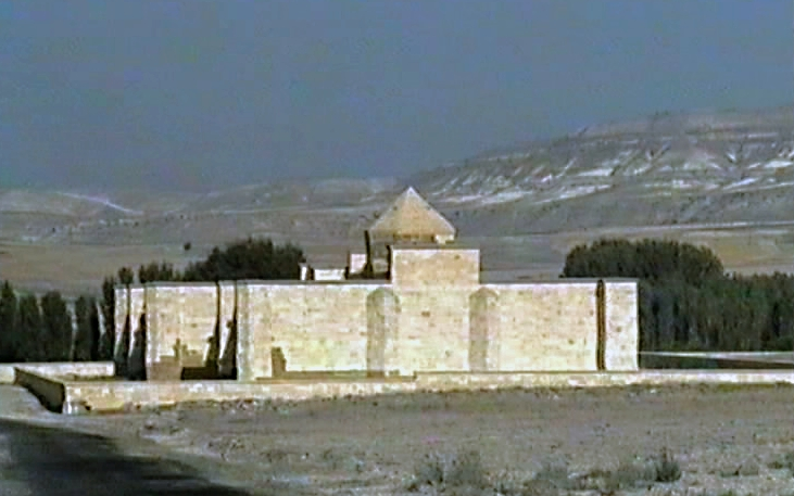 Sarıhan, Karawanserei bei Avanos in Kappadokien, Türkei